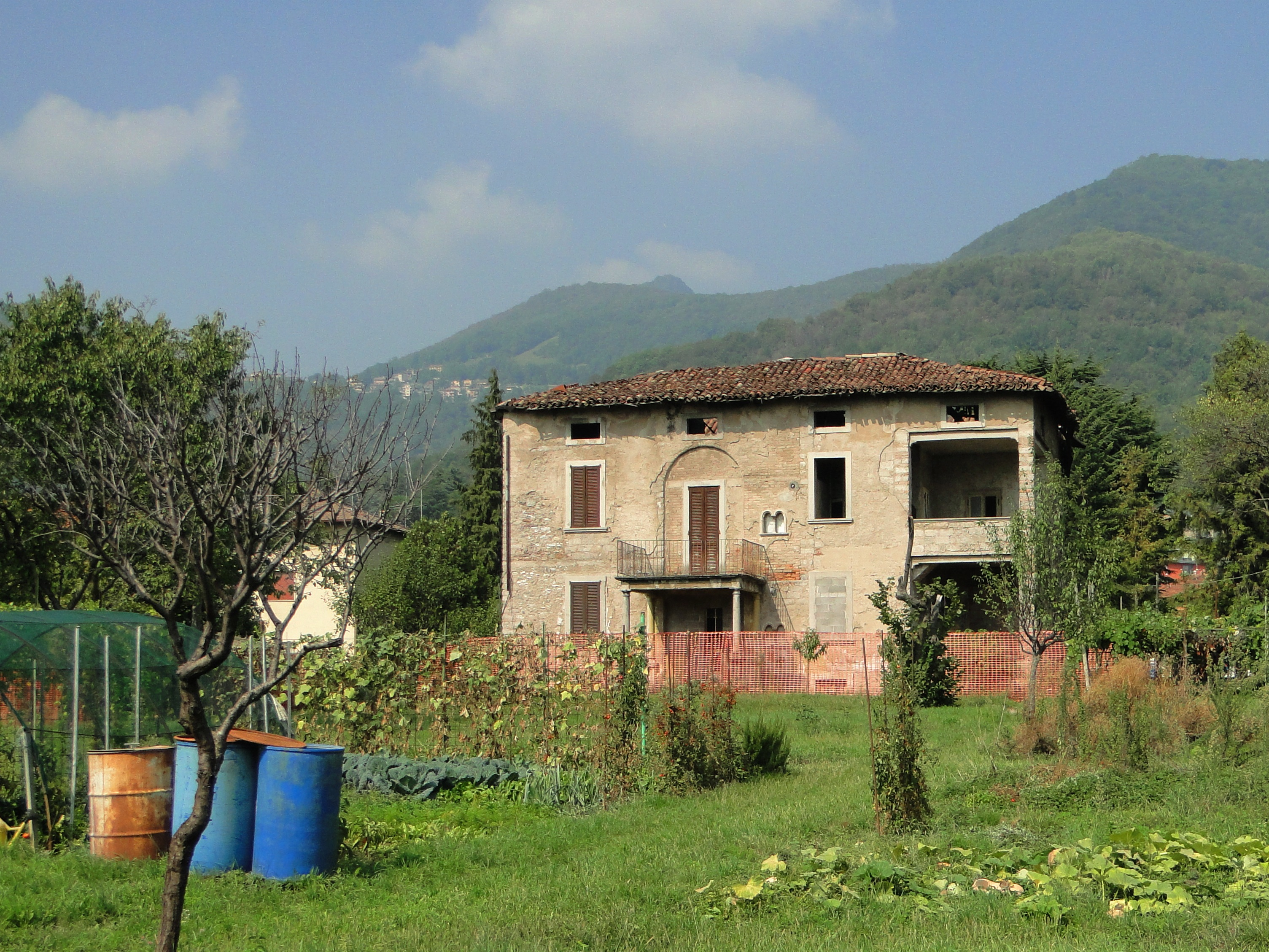 Cascina rurale presso Viana, frazione di Nembro (BG)